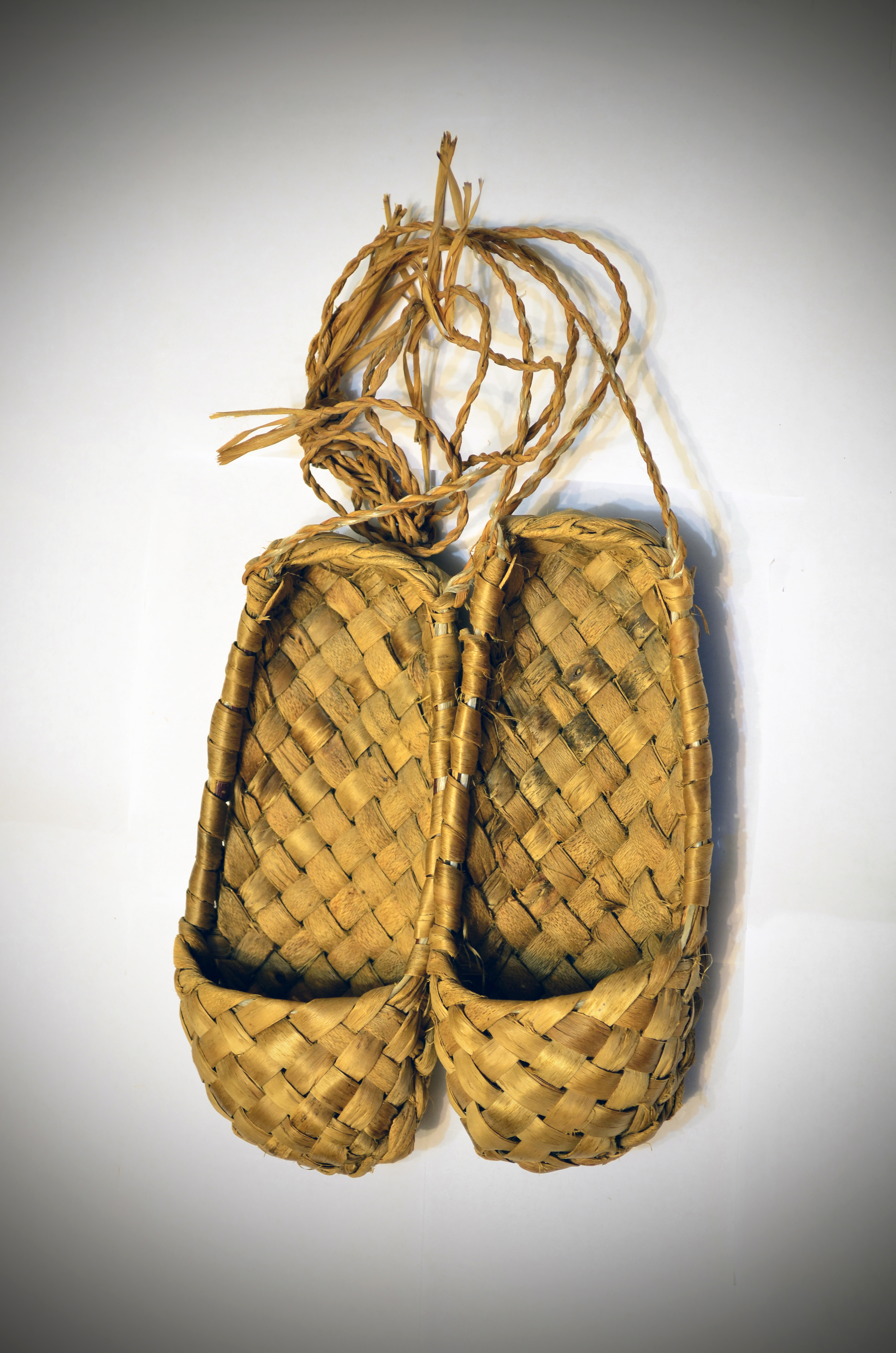 Русские лапти.Рязанская область.